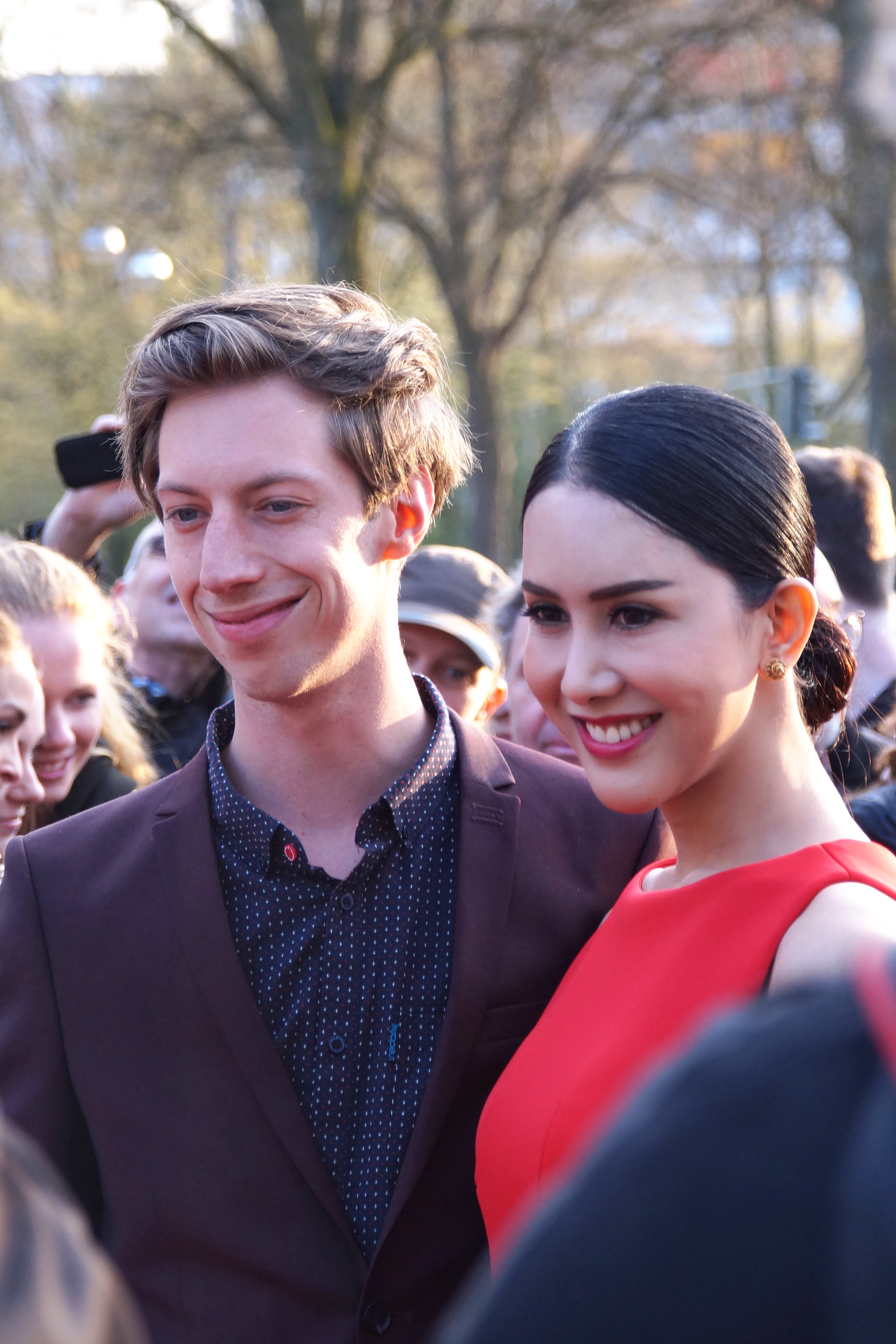 Max Mauff und Aisawanya Areyawattana bei der Verleihung des 'Grimme Preis 2016' am 08.04.2016 in Marl.